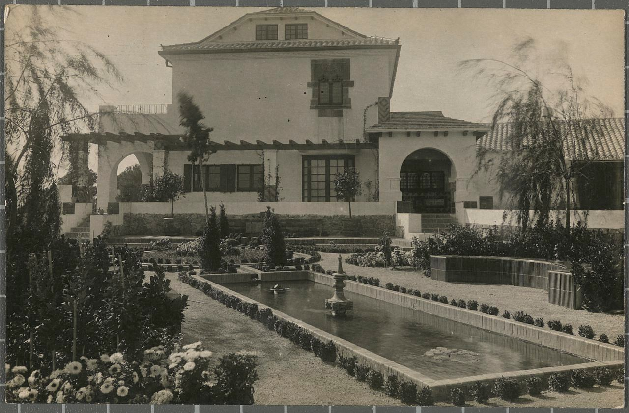 La Senya Blanca va ser el primer xalet de la Urbanització de S'Agaró obra de l'arquitecte Rafael Masó. Va ser construïda el 1924.